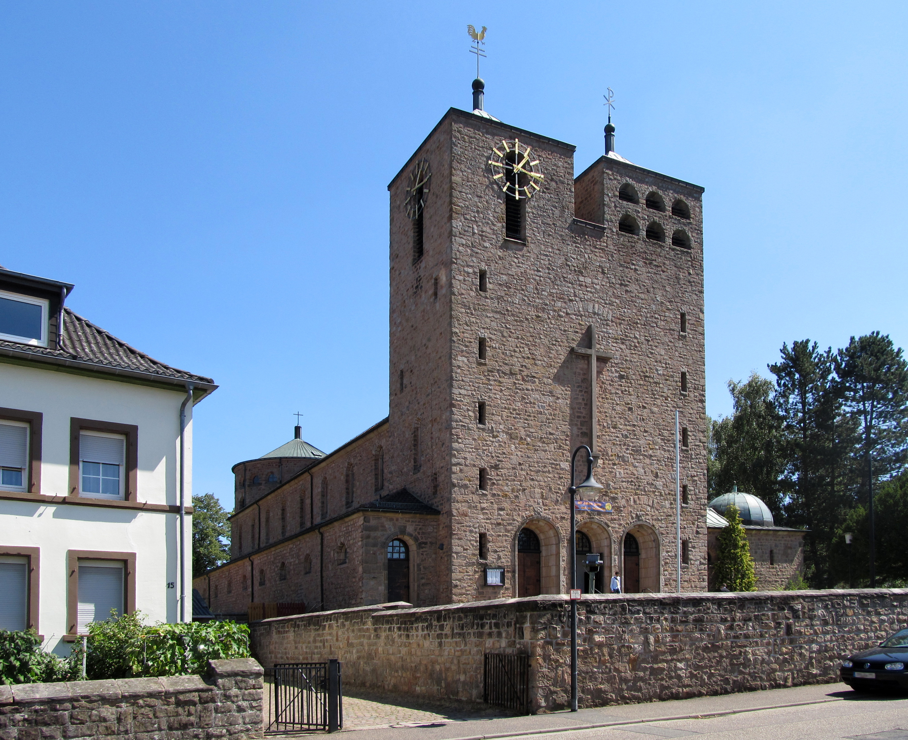 Die katholische Pfarrkirche St. Joseph in Waldfischbach-Burgalben, Kreis Südwestpfalz, Rheinland-Pfalz